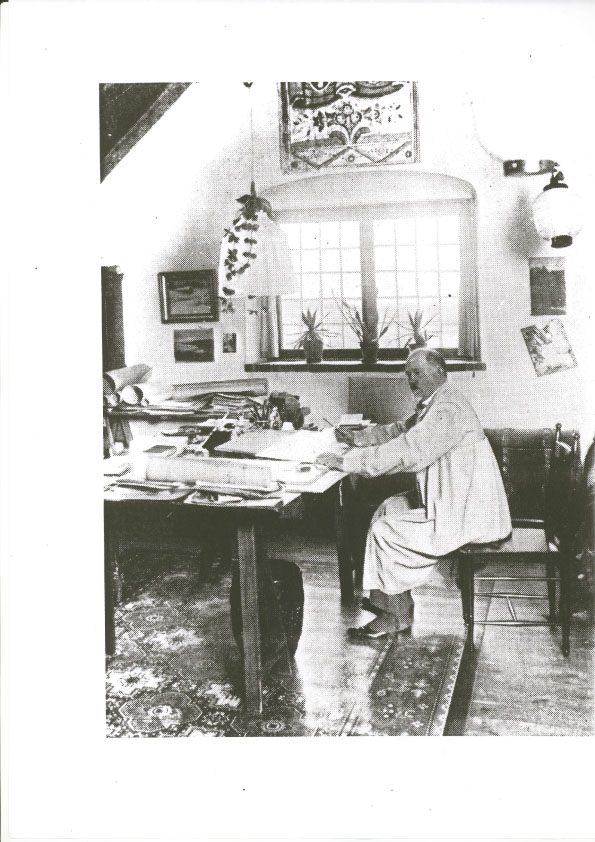 Konstnären i egen hög person